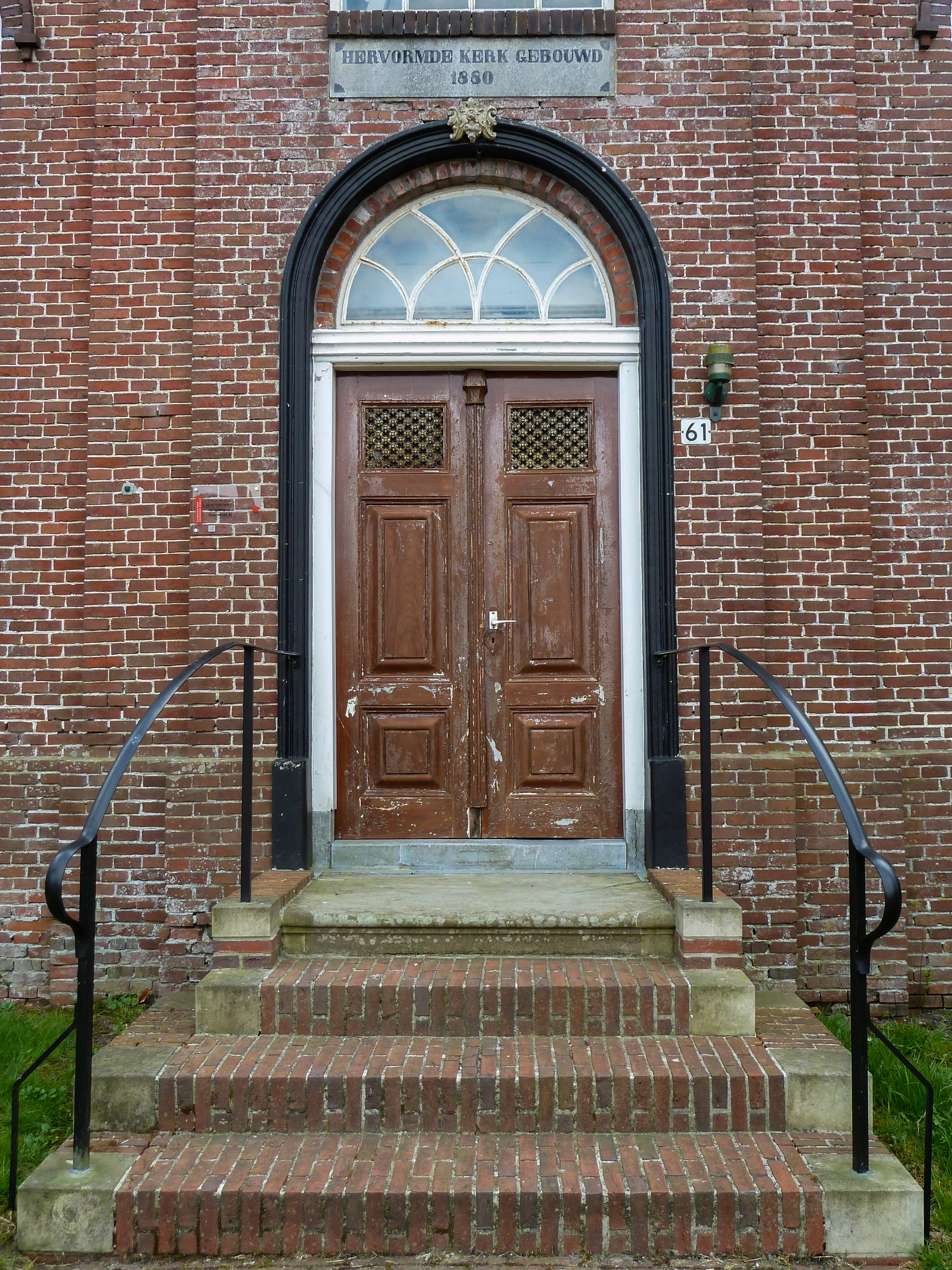 Ingangsportaal van de voormalige hervormde kerk van Overschild